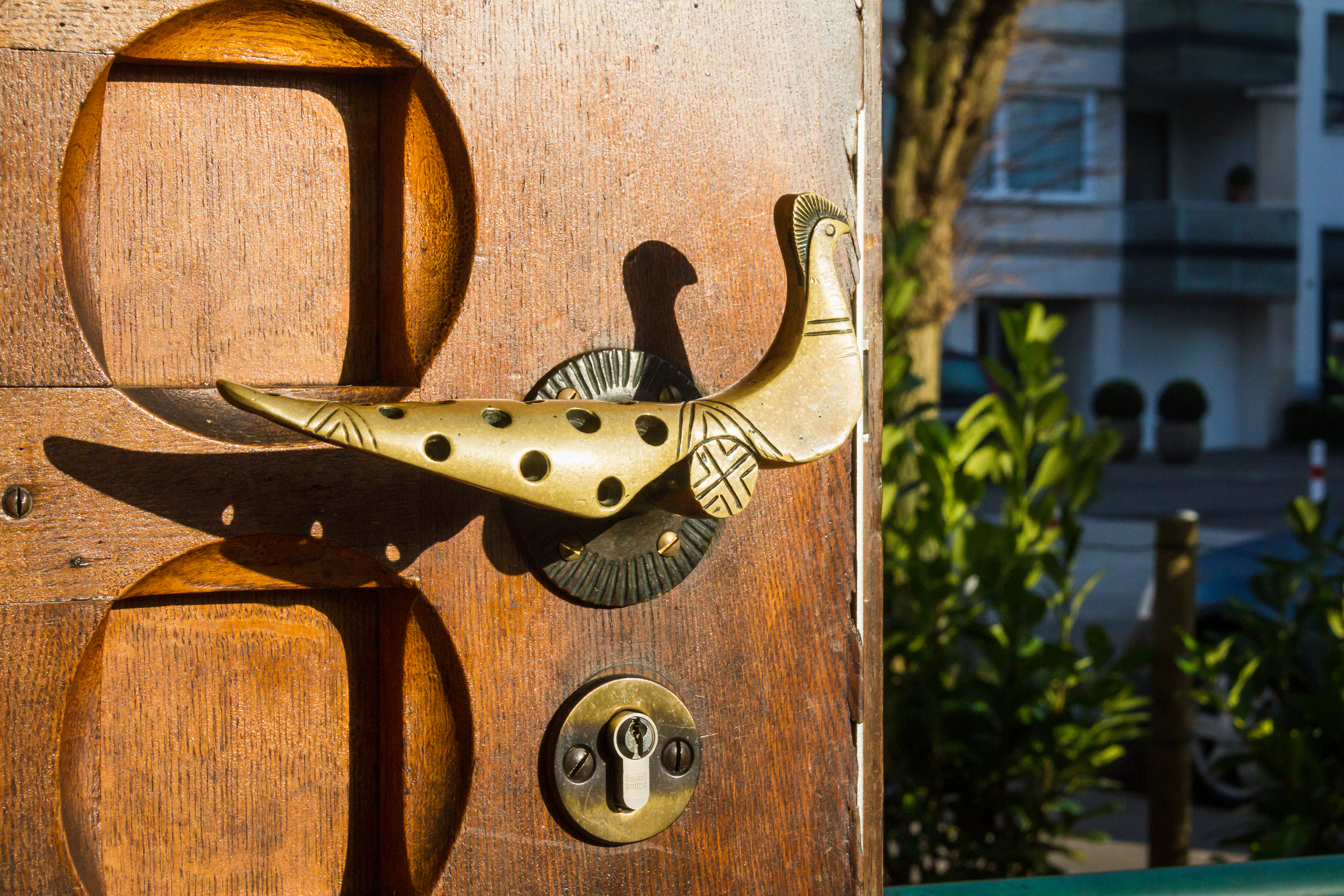 St. Joseph in Köln-Braunsfeld, hier: Türgriff des Portals